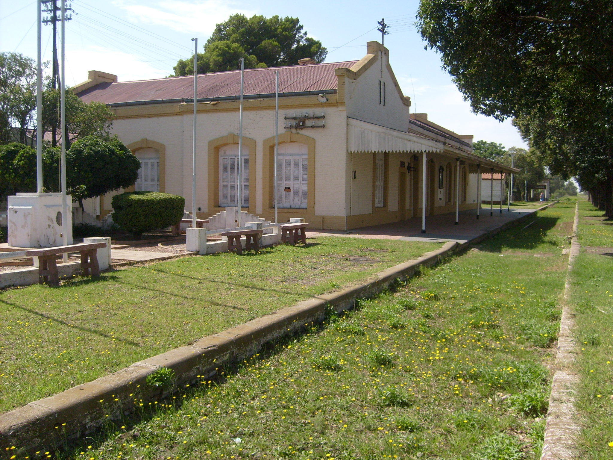 Estación de ferrocarril de Salliquelo